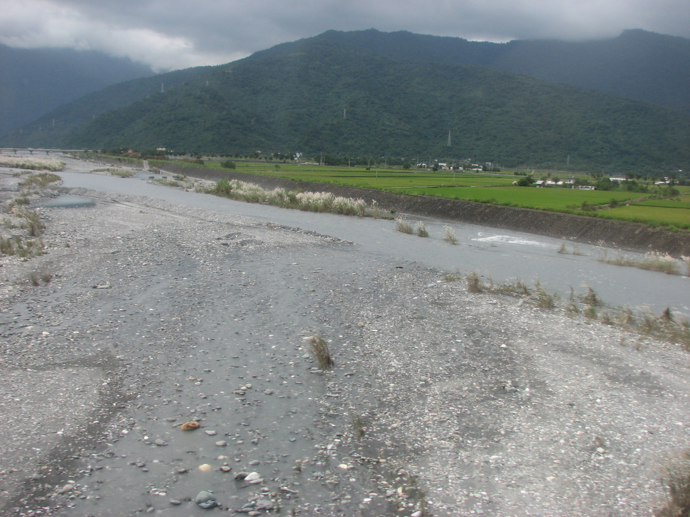 秀姑巒溪支流樂樂溪